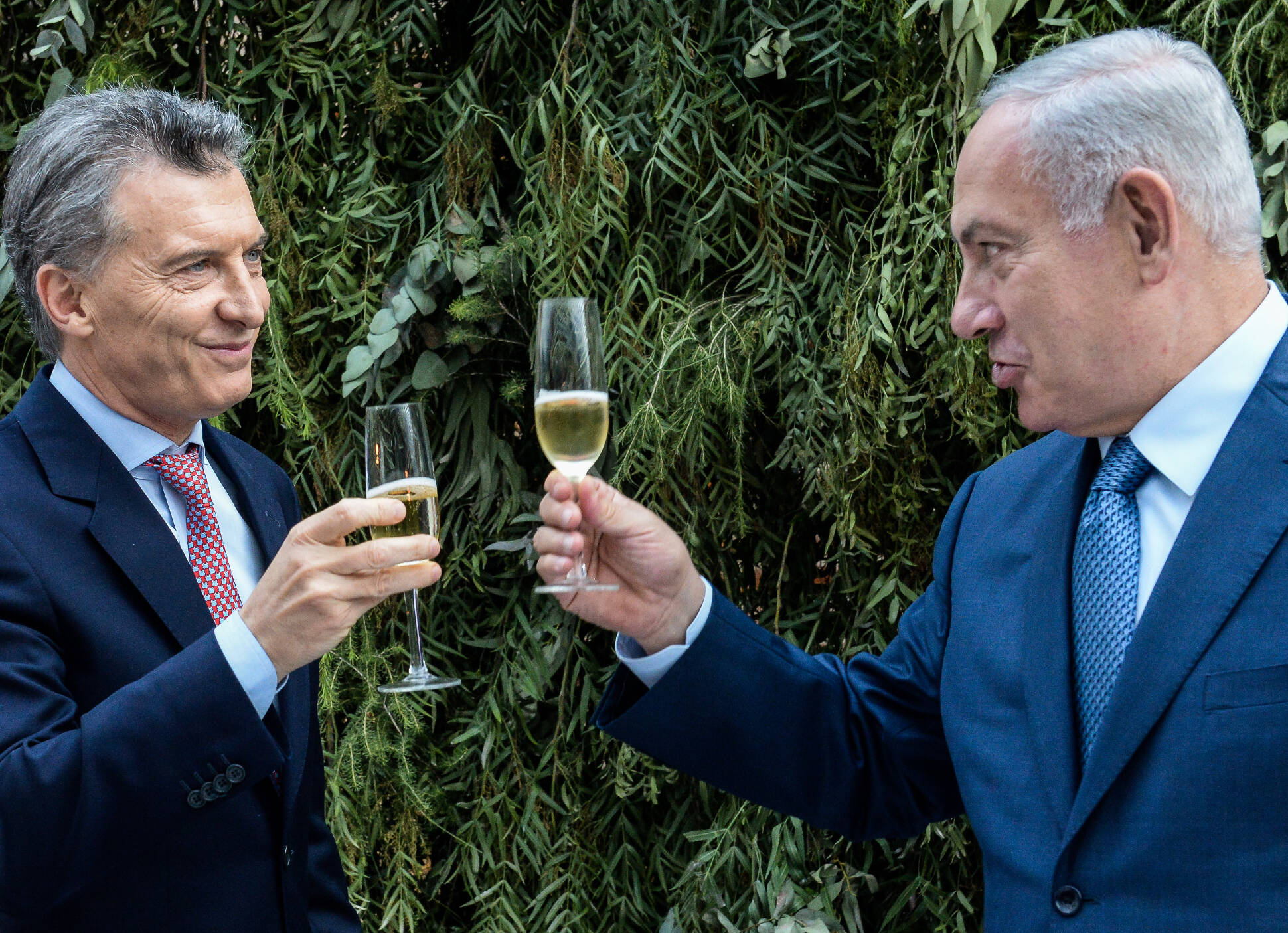 Mauricio Macri comparte un brindis con el Primer Ministro Israelí Benyamin Netanyahu